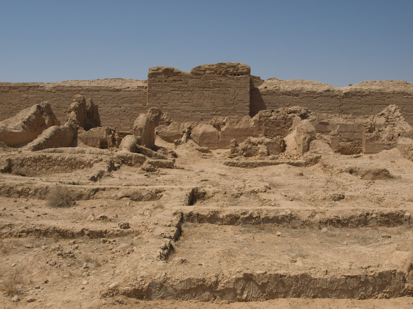 Partie sud de l'îlot L27 à hauteur de la tour 18 à Doura Europos.